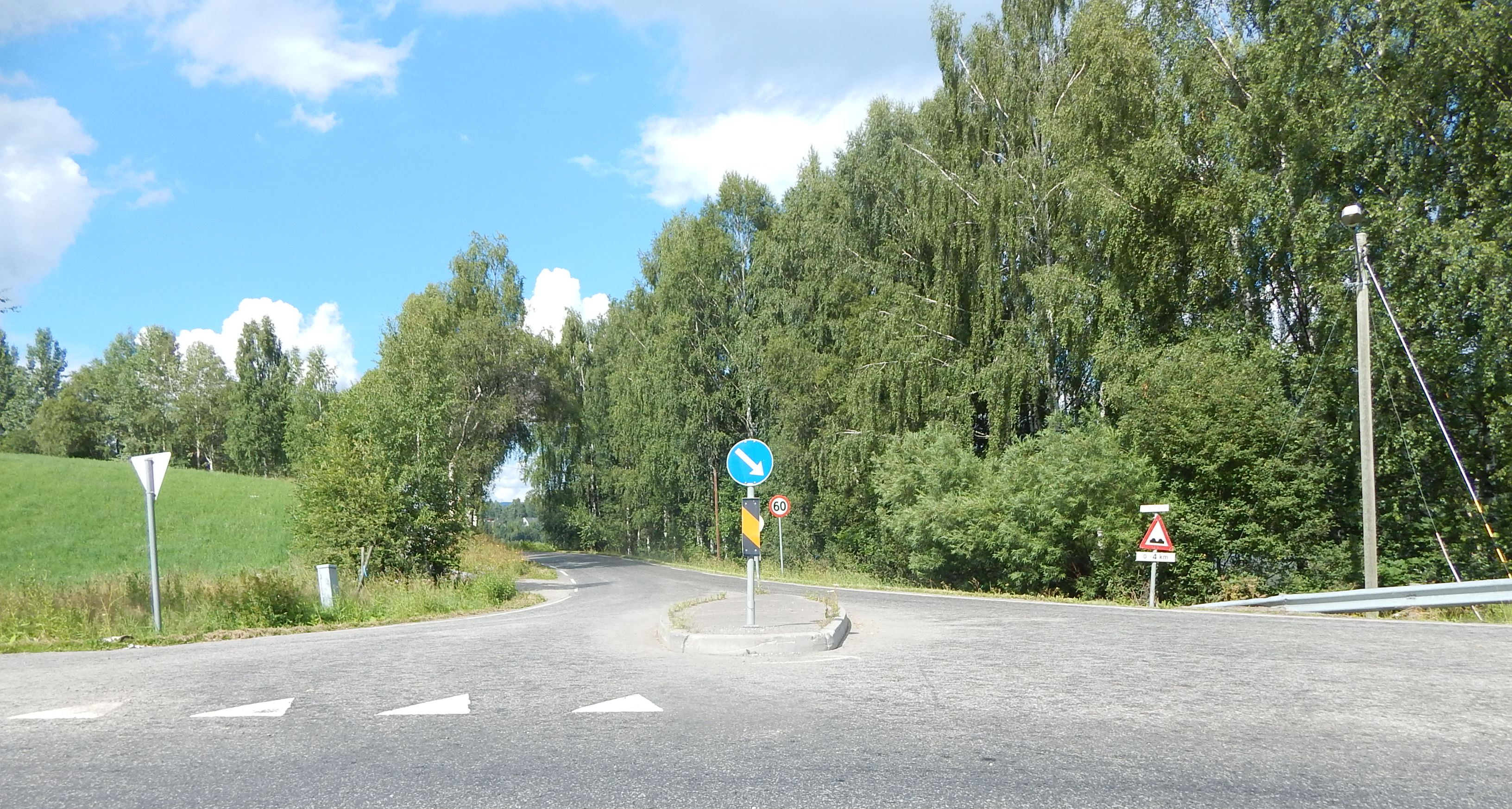 Jarenstranda (fylkesvei 2334, tidl. 58) i krysset med Ringdalslinna